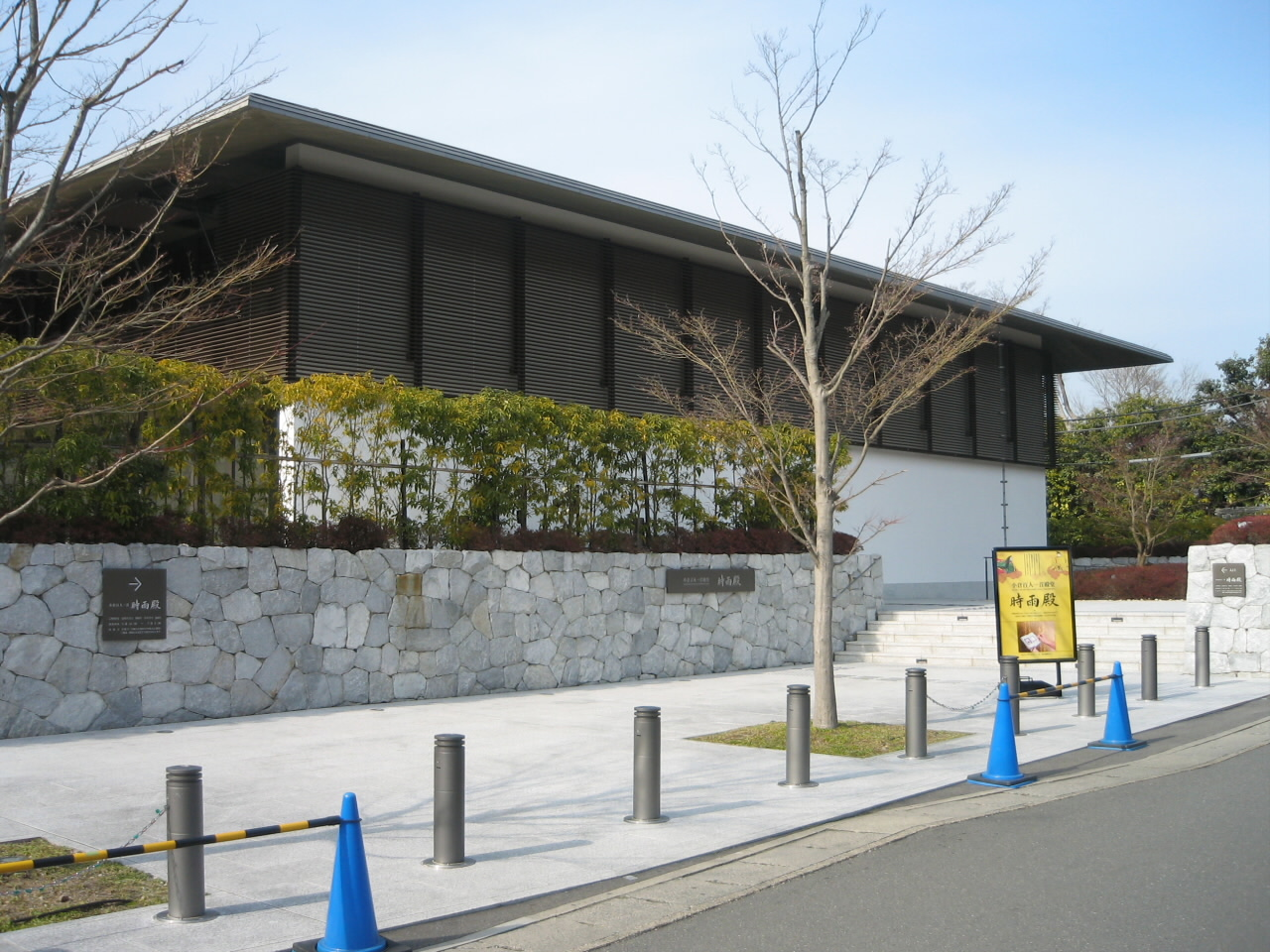 小倉百人一首の殿堂・時雨殿